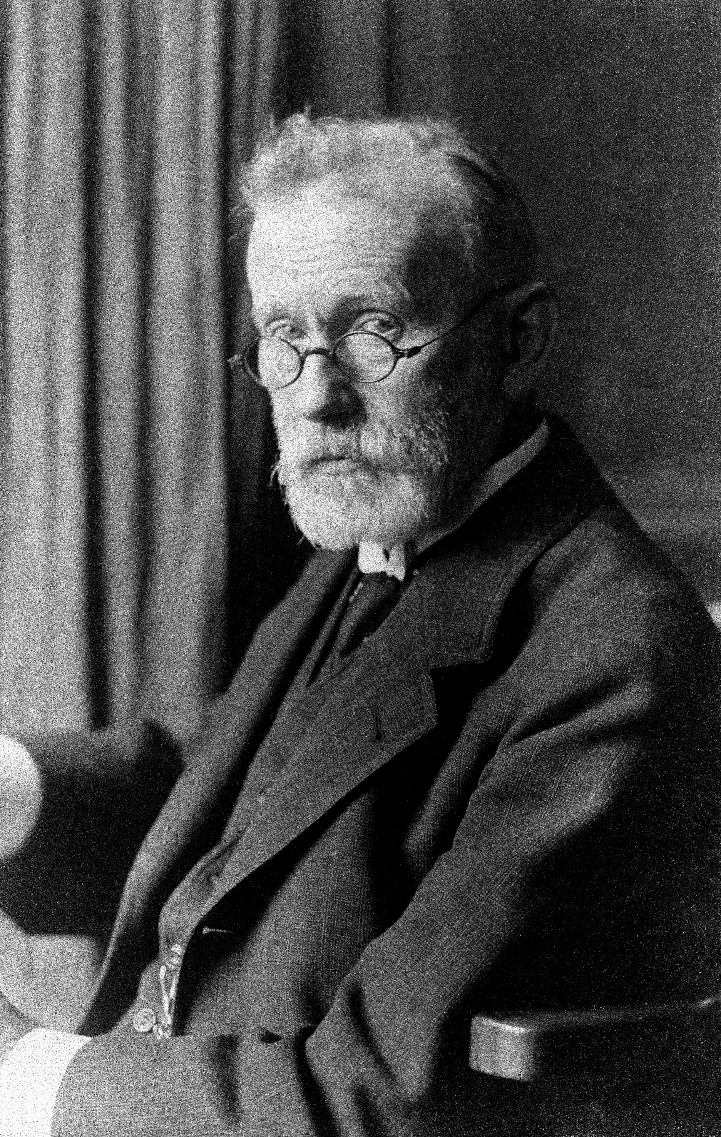 Paul Ehrlich (1854-1915) Wellcome Images Keywords: Paul Ehrlich; Eduard Blum